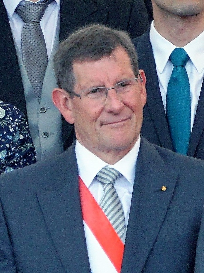 Gusty Graas, député luxembourgeois, lors de la Fête nationale luxembourgoise 2019